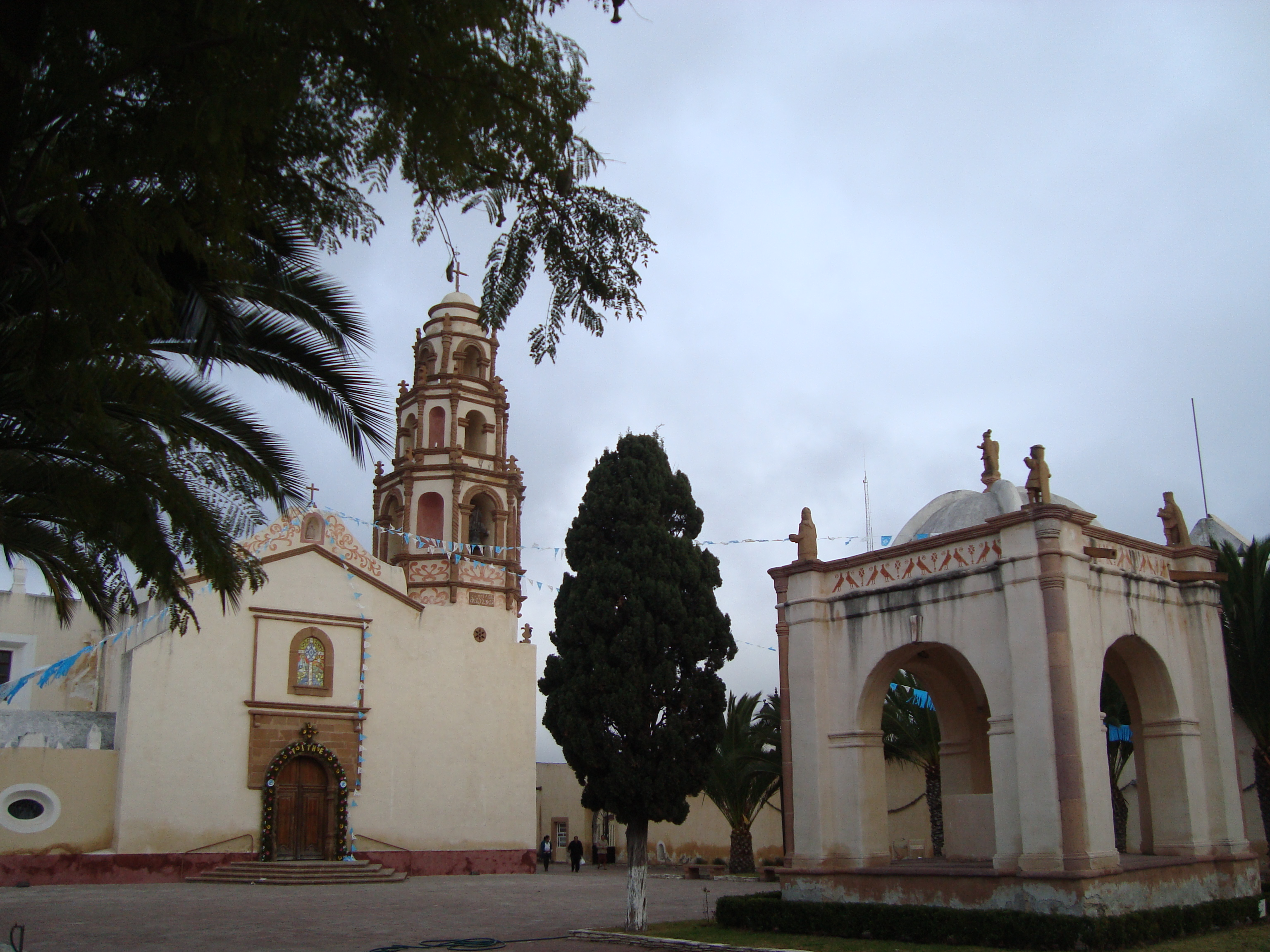 Parroquia de la Purísima Concepción en Cardonal.